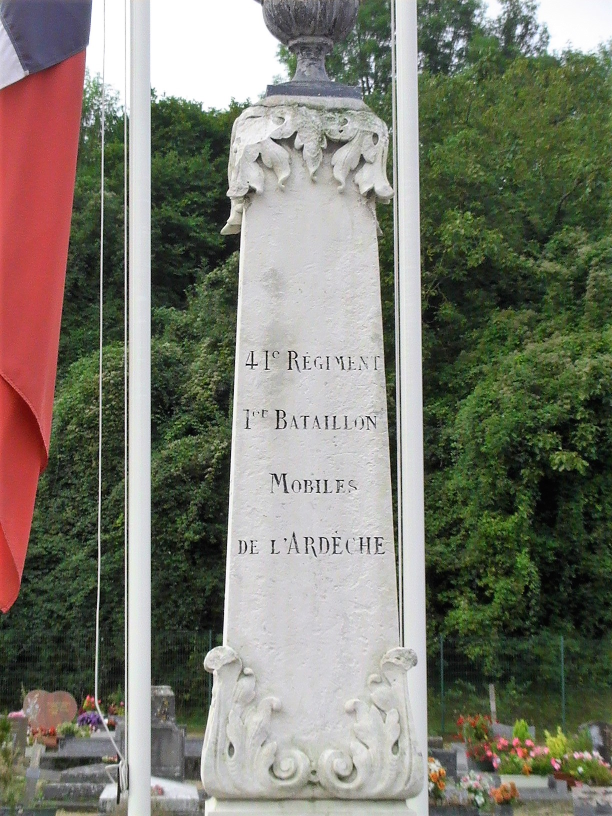 Monument aux morts de la garde mobile de l'Ardèche, défenseur de Gaillon en 1870.